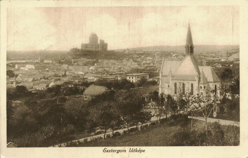 Jó pásztor-kápolna, Esztergom